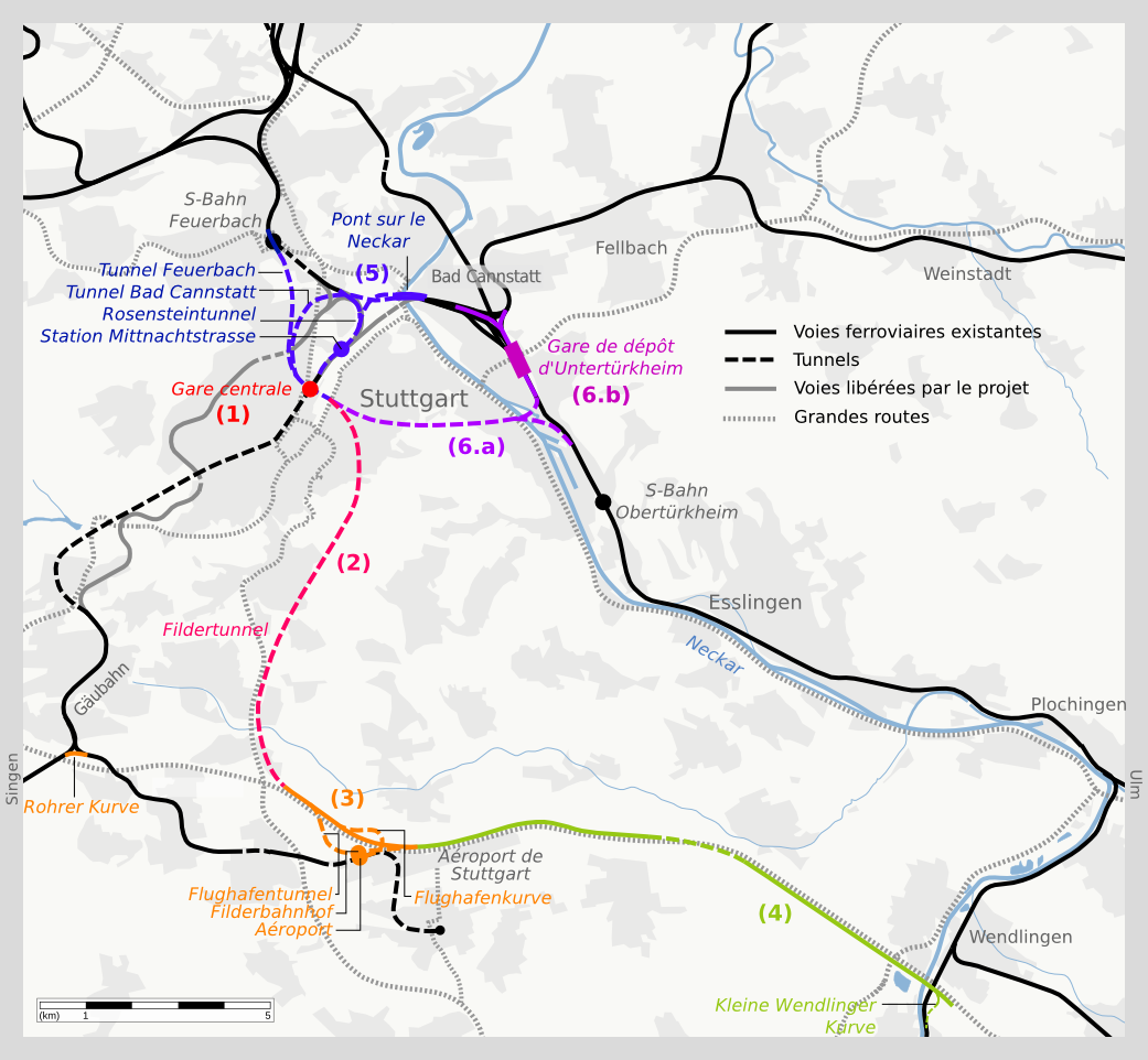 Version bitmap de File:Carte de Stuttgart 21 en français.svg